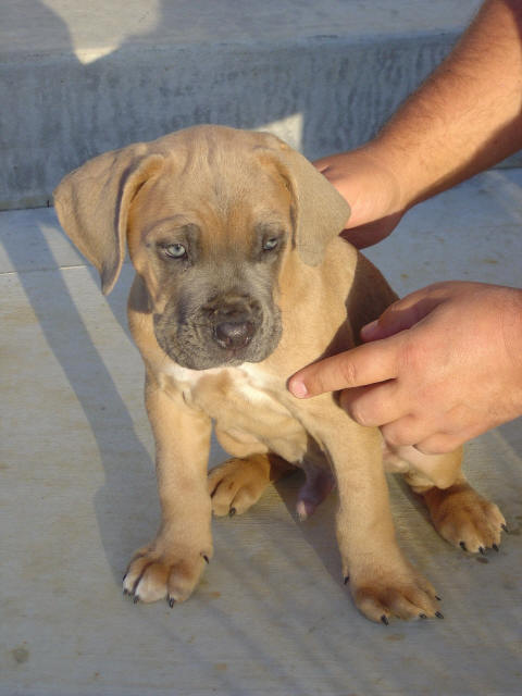 California's Cyrano